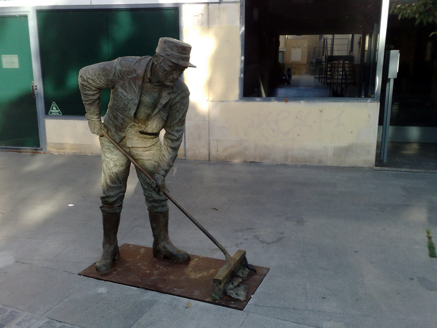 Torrelodones. Estatua homenaje a los operarios del servicio de limpieza. Vista frontal.